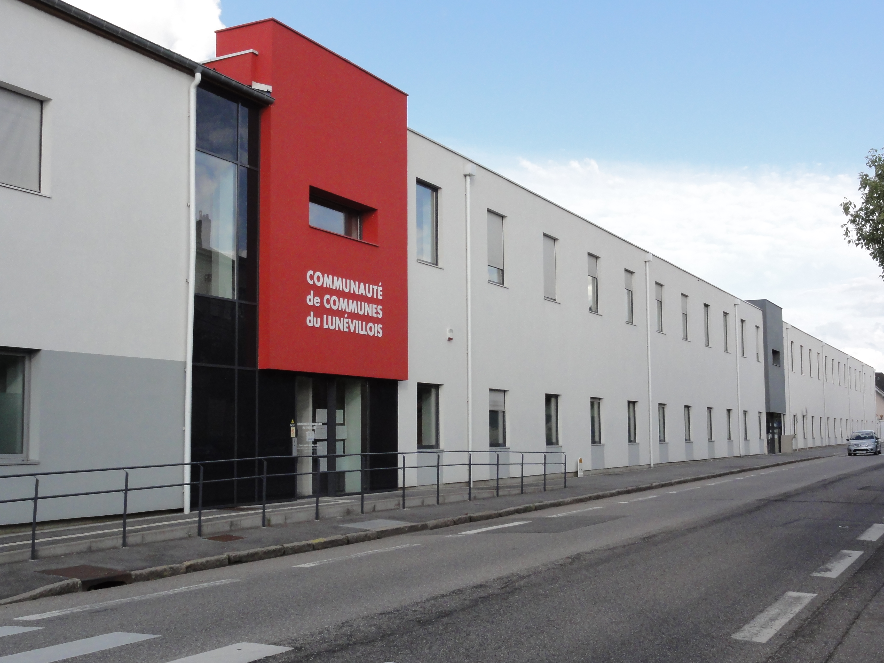 Lunéville (M-et-M) maison communauté de communes du Lunévillois